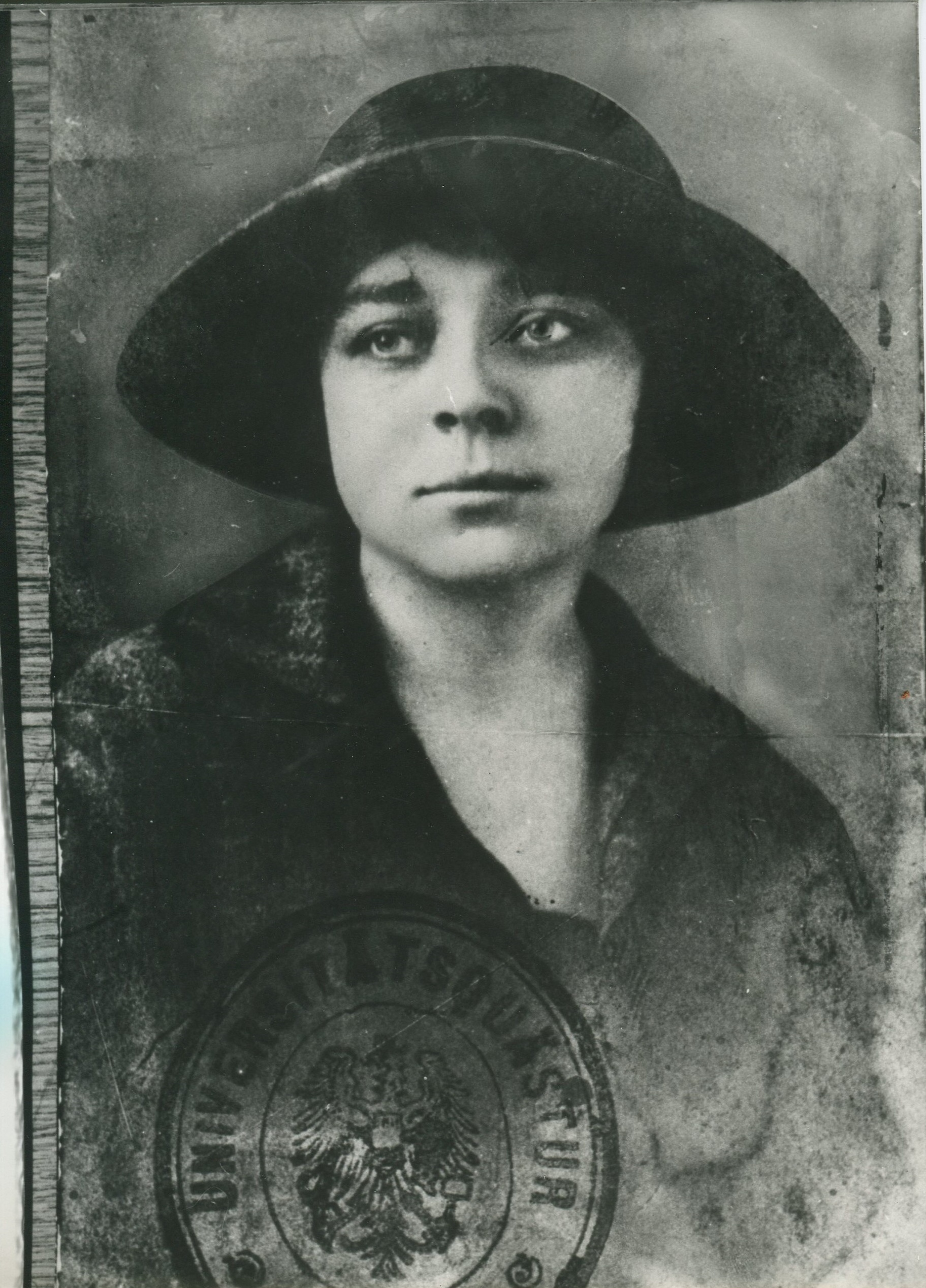 Porträt der jungen Elsbeth Weichmann vergrößert vom Universitätsausweis